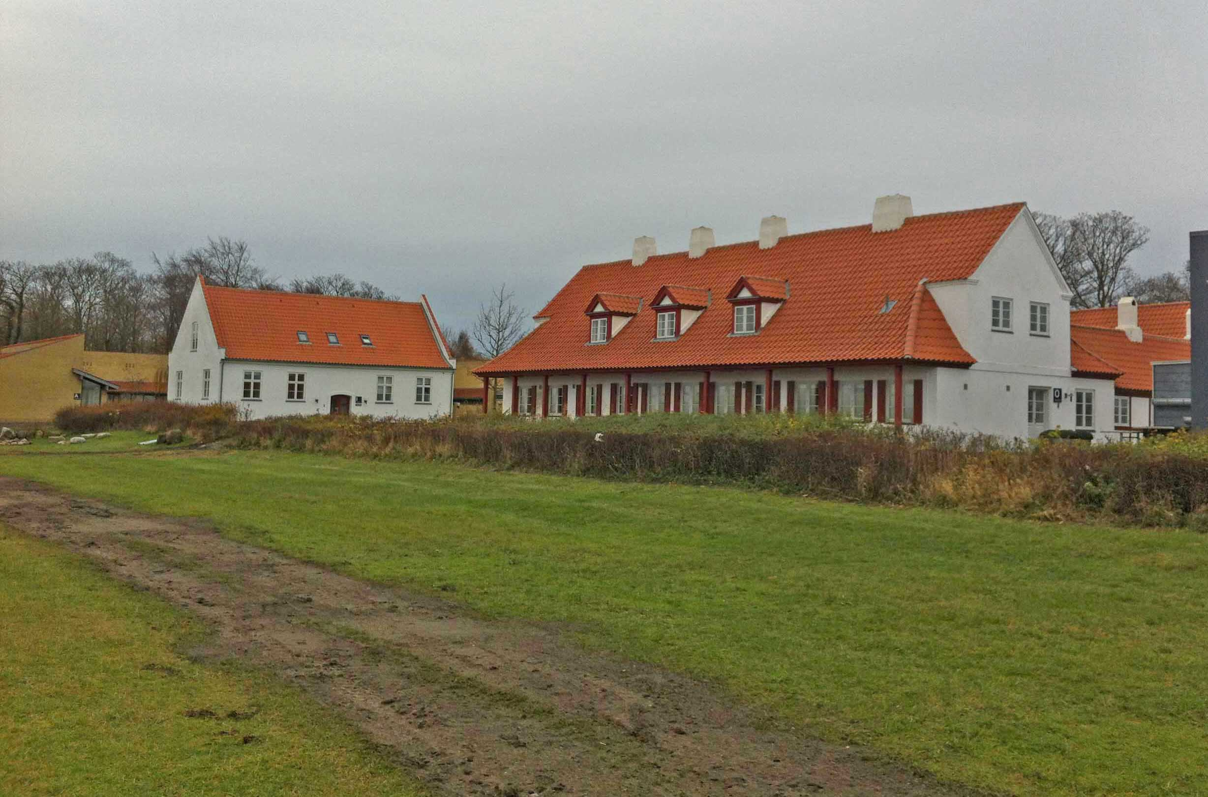 Knudshoved Stations boliger th. og oplagshus med sovestuer tv.